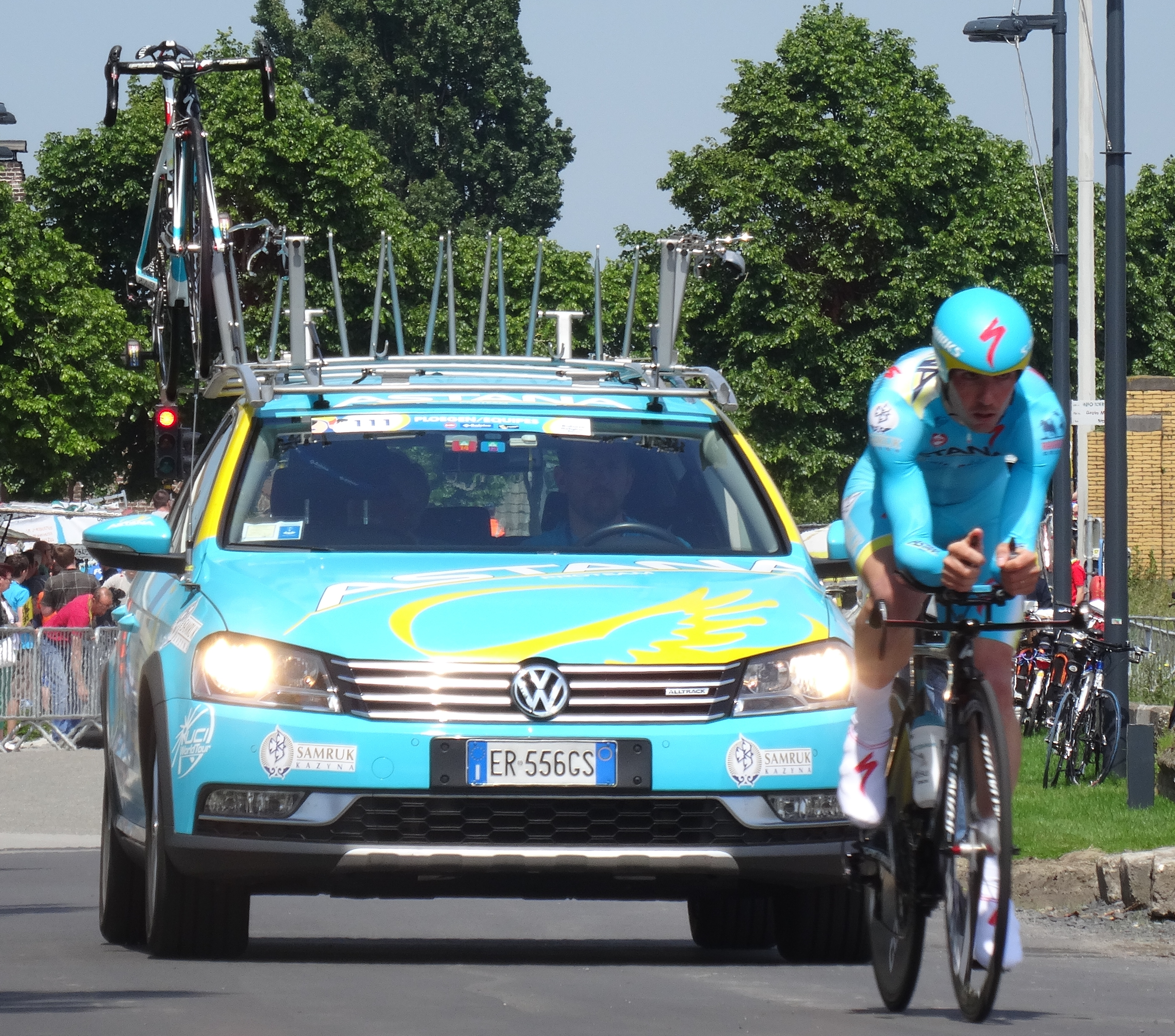 Reportage photographique réalisé le vendredi 30 mai à l'occasion du contre-la-montre individuel de la troisième étape du Tour de Belgique 2014 à Dixmude, Belgique.